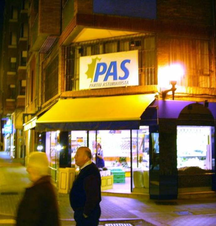 Llar del PAS en Xixón